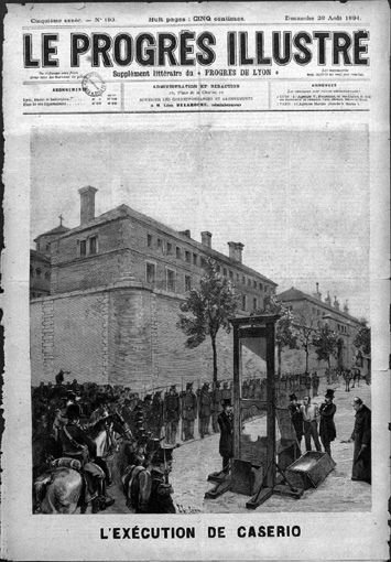 Capa de Jornal com a execução de Sante Caserio, o anarquista que eliminou o presidente Sadi Carnot.